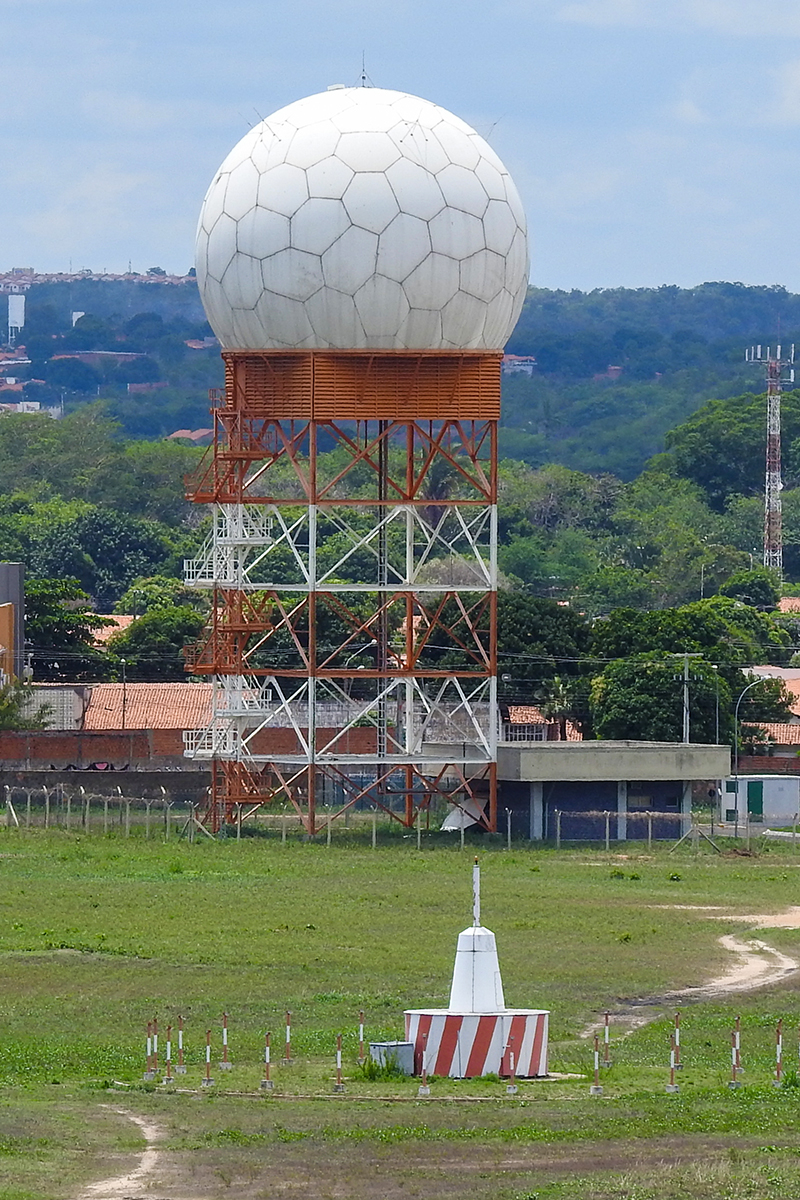 O aeroporto Senador Petrônio Portela(SBTE) localizado na zona norte de Teresina, está em contagem regressiva para colocar em operações, um radar de rota que atuará no auxilio à navegação aérea